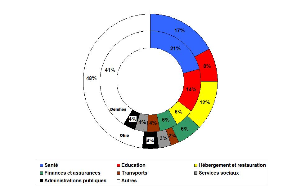 Principaux secteurs d'activité de la population féminine de Delphos (Ohio - Etats-Unis) en 2009